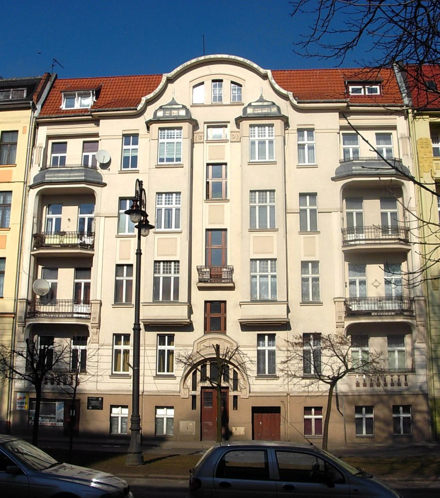 Kamienica ul. Mickiewicza 7 w Bydgoszczy, proj. Rudolf Kern, 1904-1905